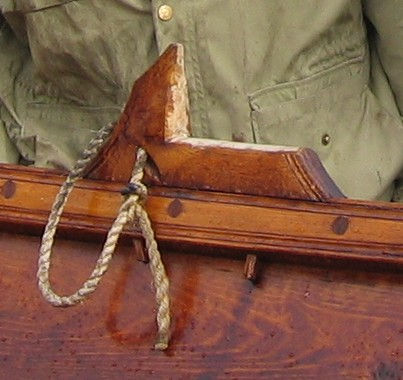 Keip fra Hardanger